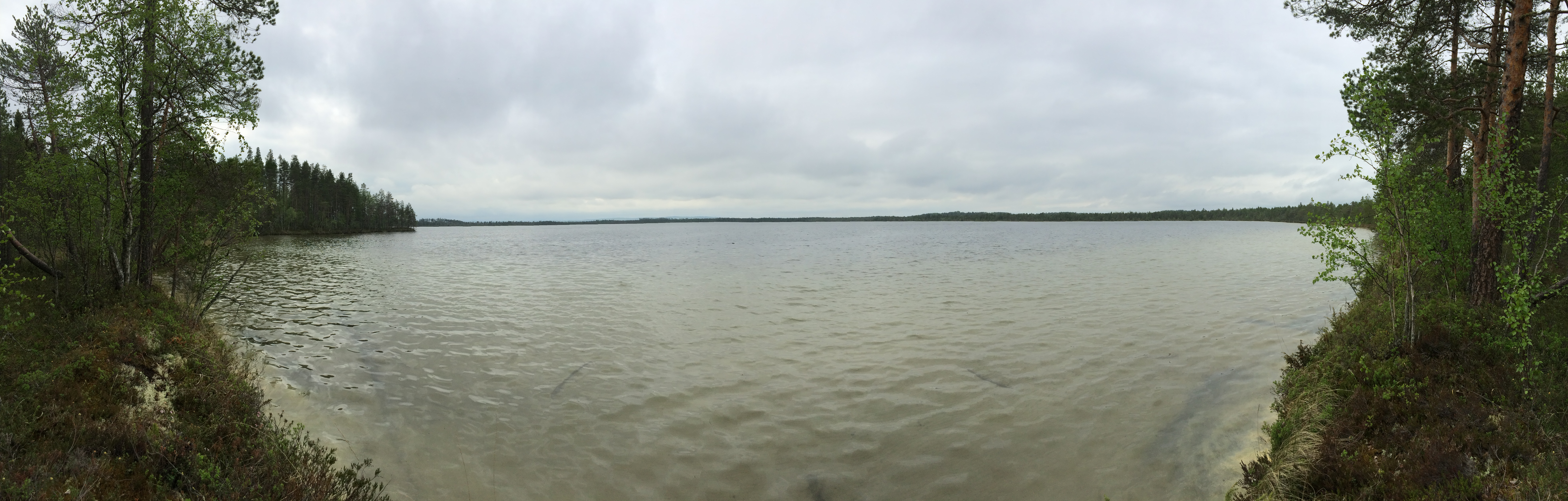 Вягозеро